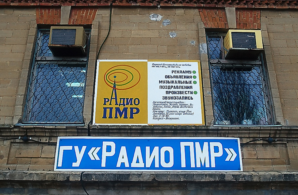 Radio PMR